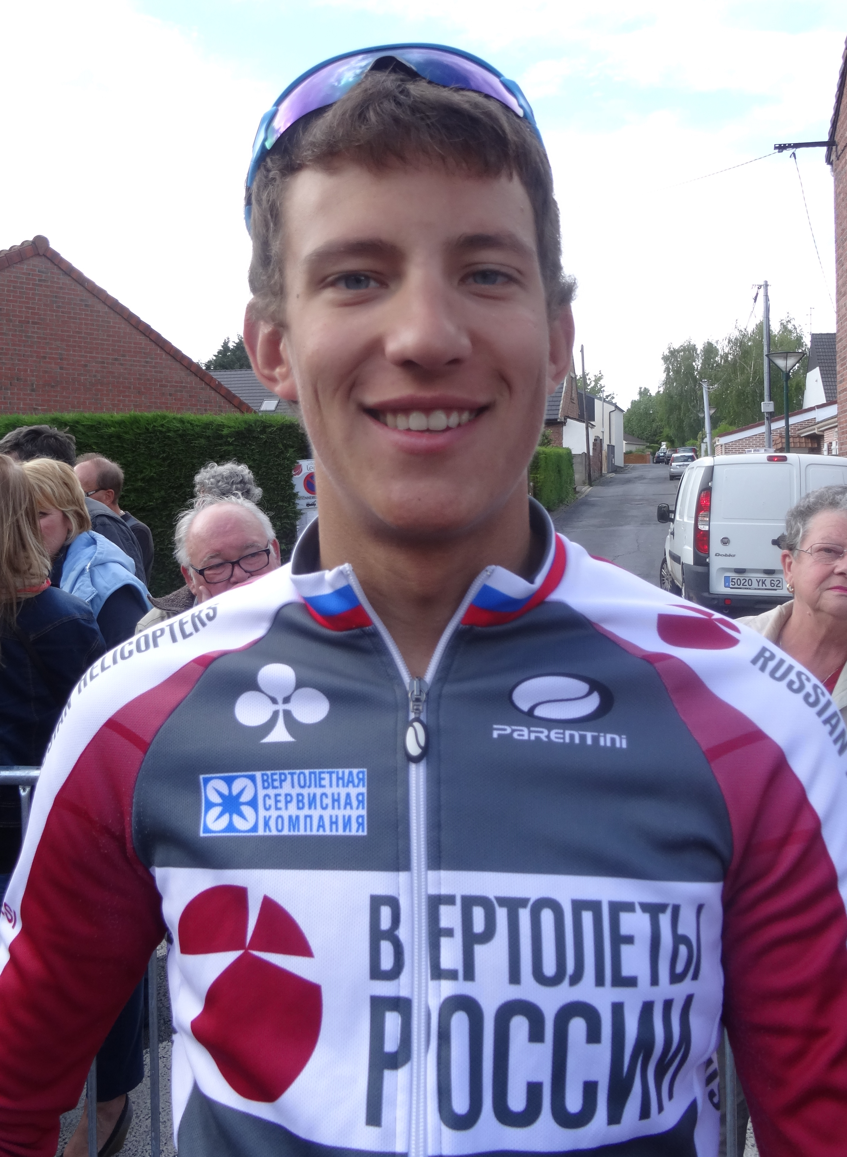 Reportage photographique réalisé le vendredi 23 mai 2014 à l'occasion du départ de la première étape du Paris-Arras Tour 2014 à Lens, Pas-de-Calais, Nord-Pas-de-Calais, France. Depicted person: Alexander Evtushenko Depicted team: Russian Helicopters